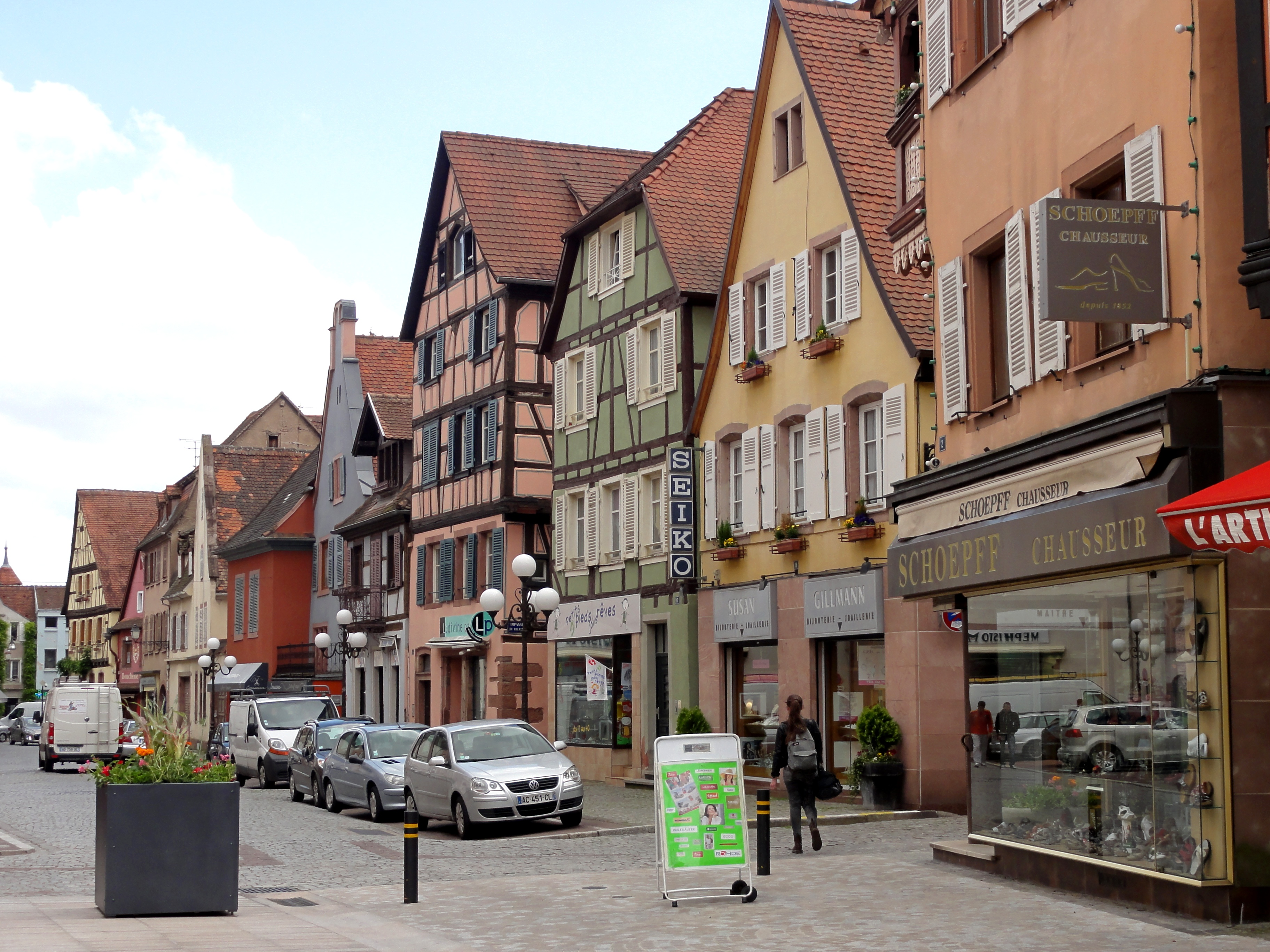 Alsace, Bas-Rhin, Sélestat, Place de la Victoire, rue Sainte-Barbe.